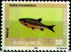 Rutilus macedonicus